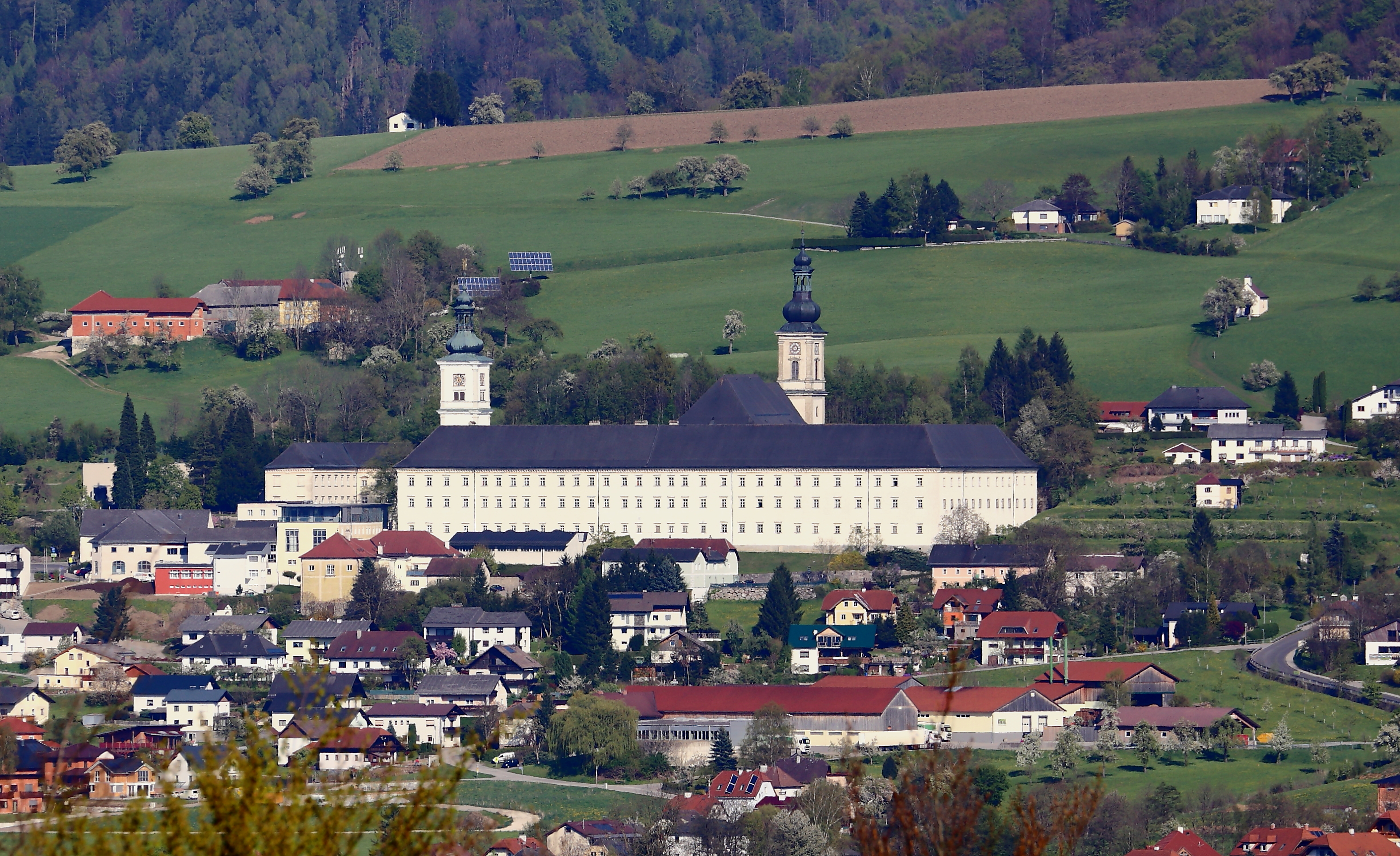 Westansicht des Zisterzienserstiftes in der oberösterreichischen Gemeinde Schlierbach. Das Stift wurde 1355 von Eberhard V. von Wallsee als Frauenkloster gegründet und 1556 aufgelöst. 1620 erfolgte eine Neubesiedelung und Umwandlung in ein Männerkloster. Ab 1672 erfolgte unter Abt Nivard I. Geyregger ein vollständiger Neubau, der unter Abt Nivard II. Dierer (1696-1715) vollendet wurde.